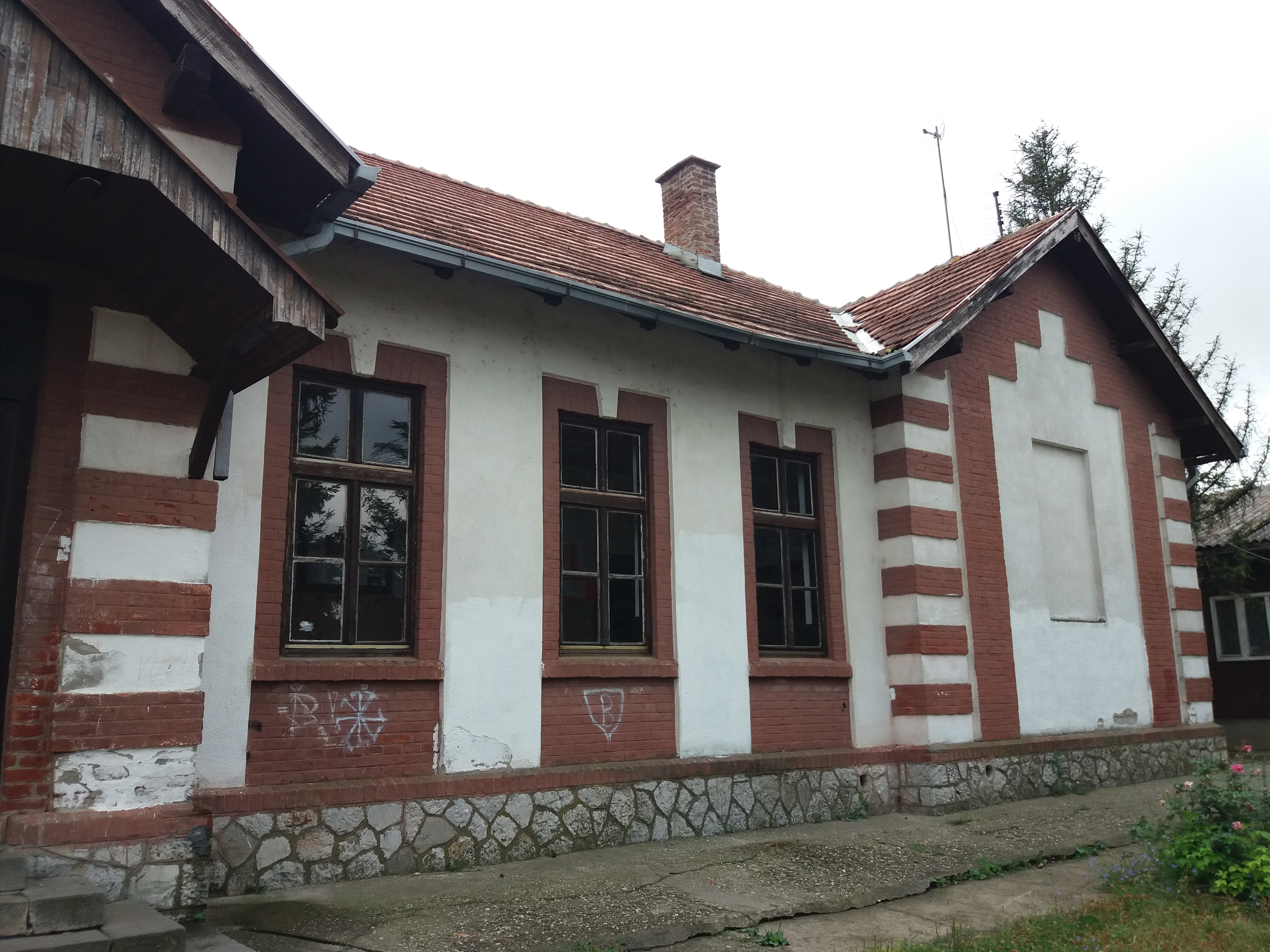 Srpski (latinica): Osnovna škola Nikola Tesla, Golobok